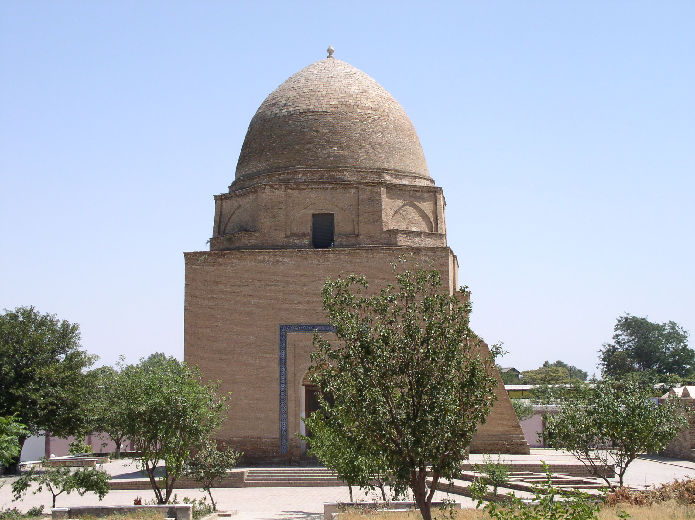 Ruhabad Mausoleum — near Guri Amir in Samarqand, Uzbekistan.